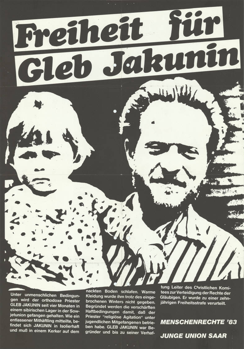 Freiheit für Gleb Jakunin Unter unmenschlichen Bedingungen wird der orthodoxe Priester Gleb Jakunin seit vier Monaten in einem sibirischen Lager in der Sowjetunion gefangen gehalten ... Gleb Jakunin war Begründer und bis zu seiner Verhaftung Leiter des Christlichen Komitees zur Verteidigung der Rechte der Gläubigen. Er wurde zu einer zehnjährigen Freiheitsstrafe verurteilt. Menschenrechte '83 Junge Union Saar Abbildung: Porträtzeichnung mit Kind Plakatart: Kandidaten-/Personenplakat mit Porträt Auftraggeber: JU Saar Objekt-Signatur: 10-028 : 383 Bestand: Plakate von Jugendorganisationen der Parteien ( 10-028) GliederungBestand10-18: Plakate von Jugendorganisationen der Parteien (10-028) » CDU » Personen- und Kandidatenplakate Lizenz: KAS/ACDP 10-028 : 383 CC-BY-SA 3.0 DE